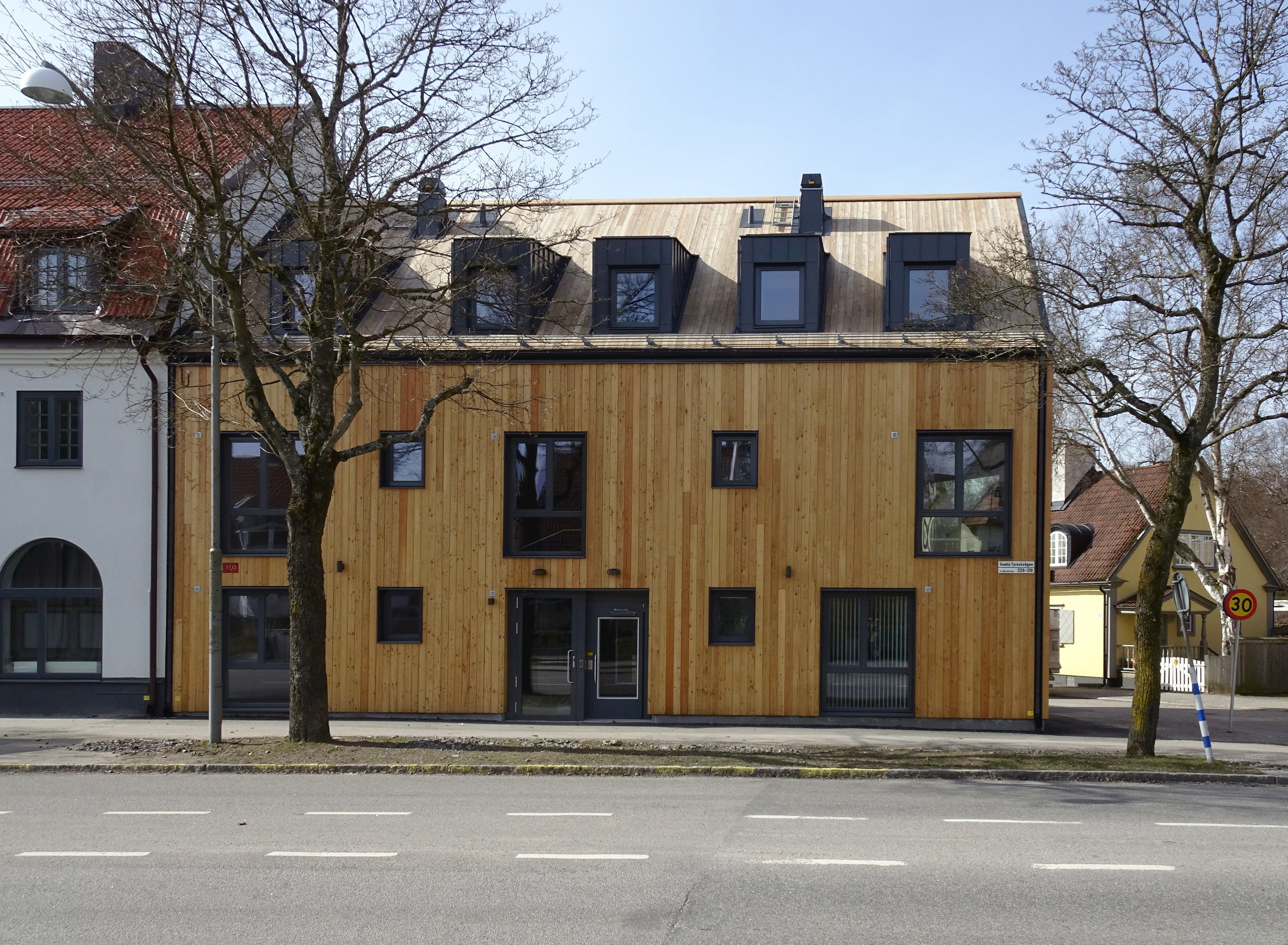 Fastigheten Modellvillan 21, Gamla Tyresövägen 310, Enskededalen